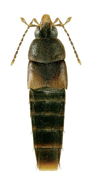 Myllaena vulpina